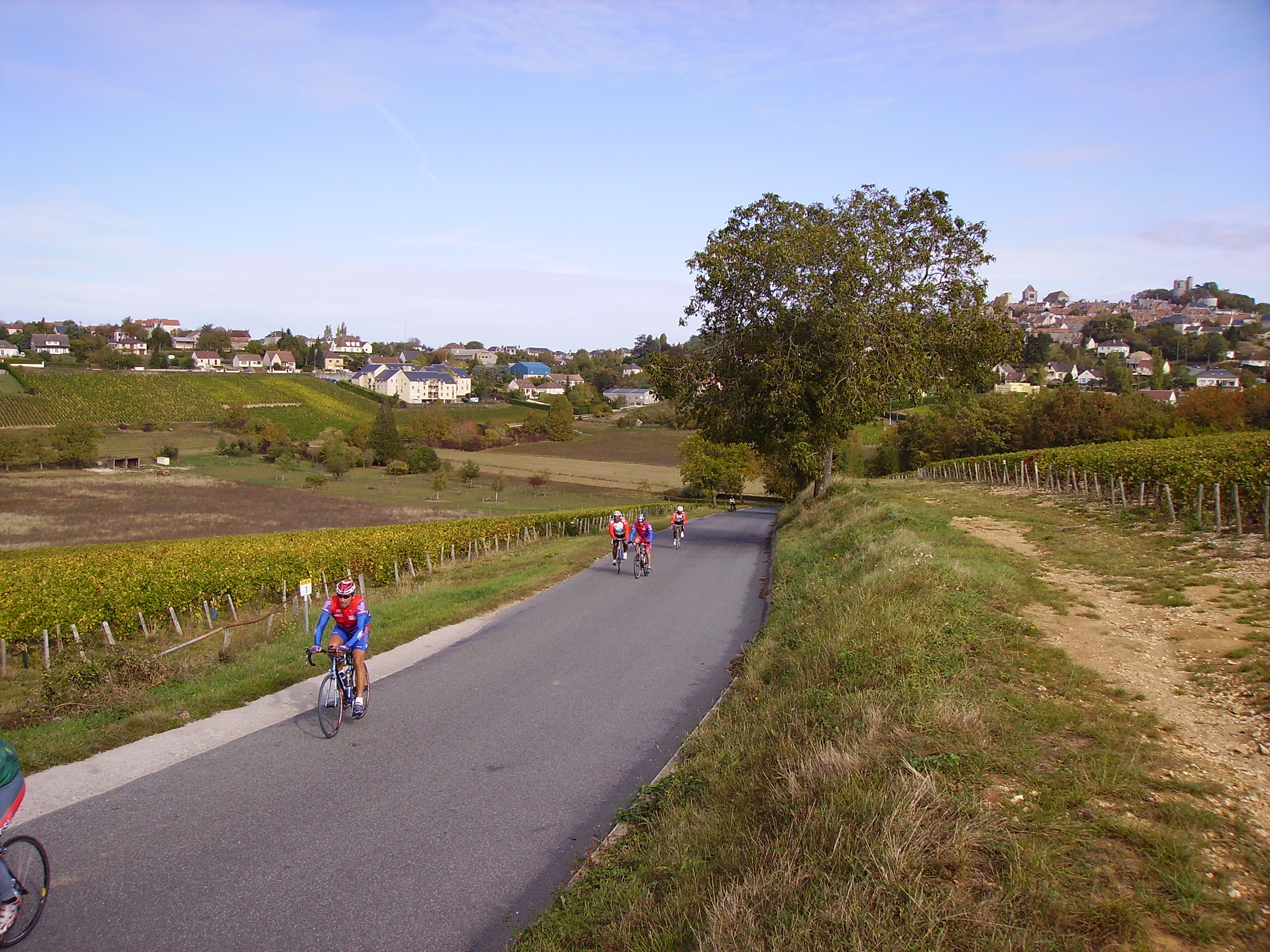 Rallye des Vignobles dans l'AOC sancerre. Près de Sancerre, cyclistes montant un coteau sur la route départementale D307, et se dirigeant vers Ménétréol-sous-Sancerre. La redoutable côte (longueur 1,5 km ; pente jusqu'à environ 10 %) de l'Orme au Loup se trouve non loin, vers Ménétréol-sous-Sancerre.